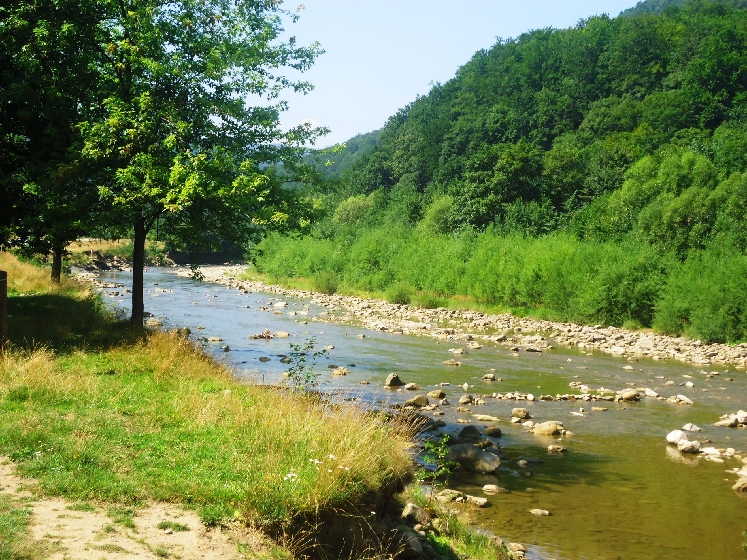 Річка Мізунка влітку